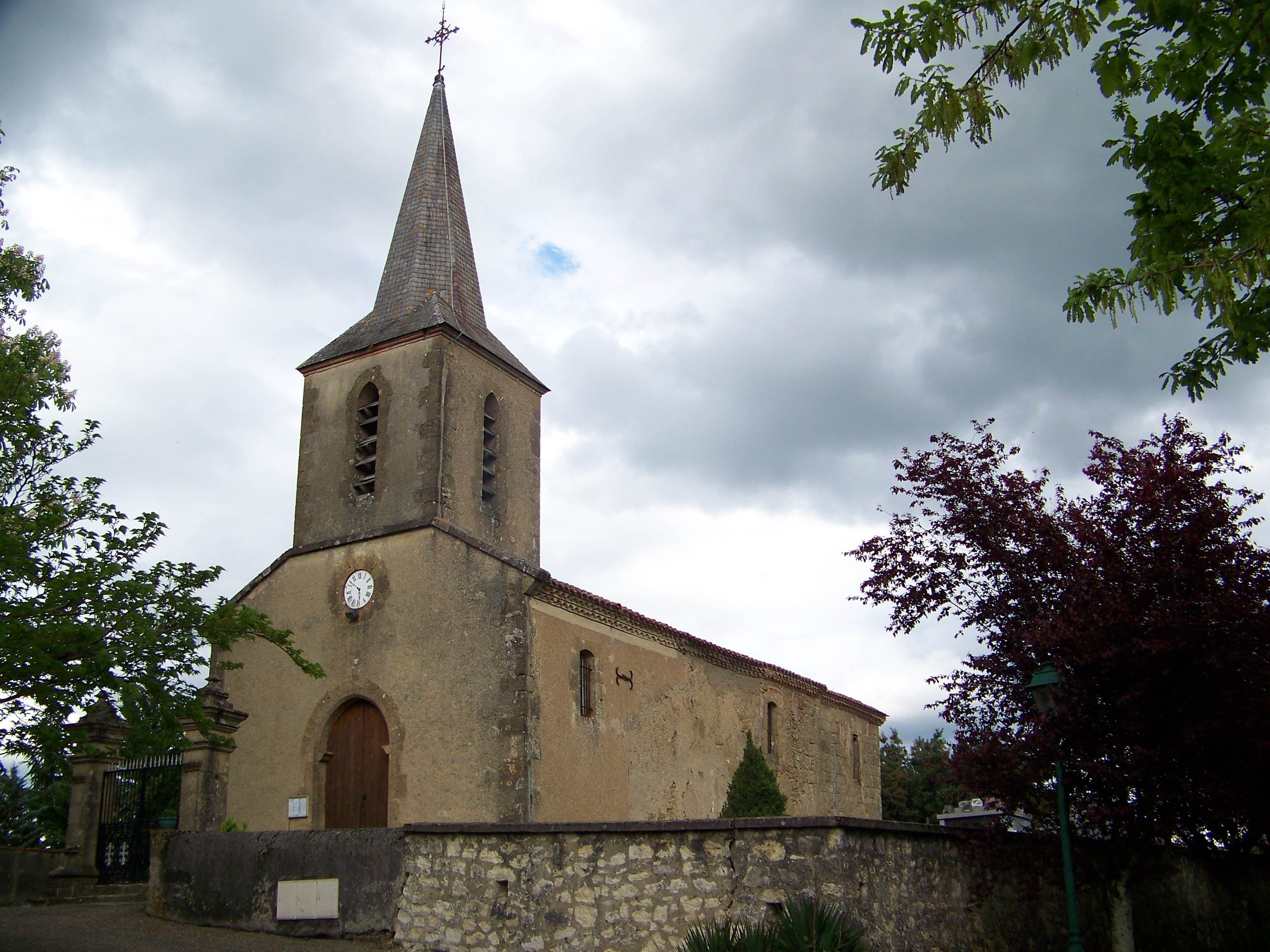 Église de Saint-Pierre-d'Aubézies (canton d'Aignan, Gers)